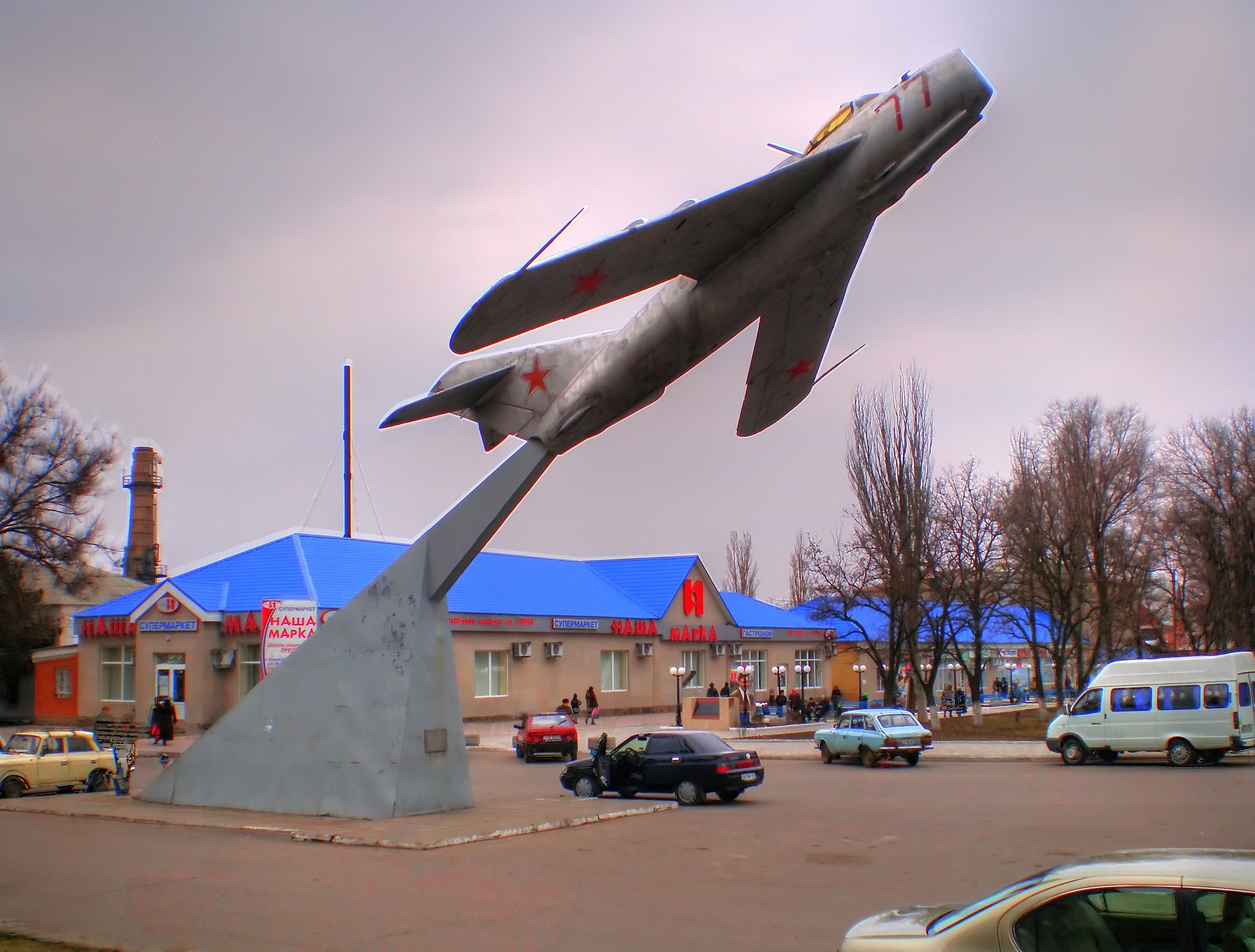 Самолёт-памятник МиГ-17, Комсомольская площадь, г. Новоазовск